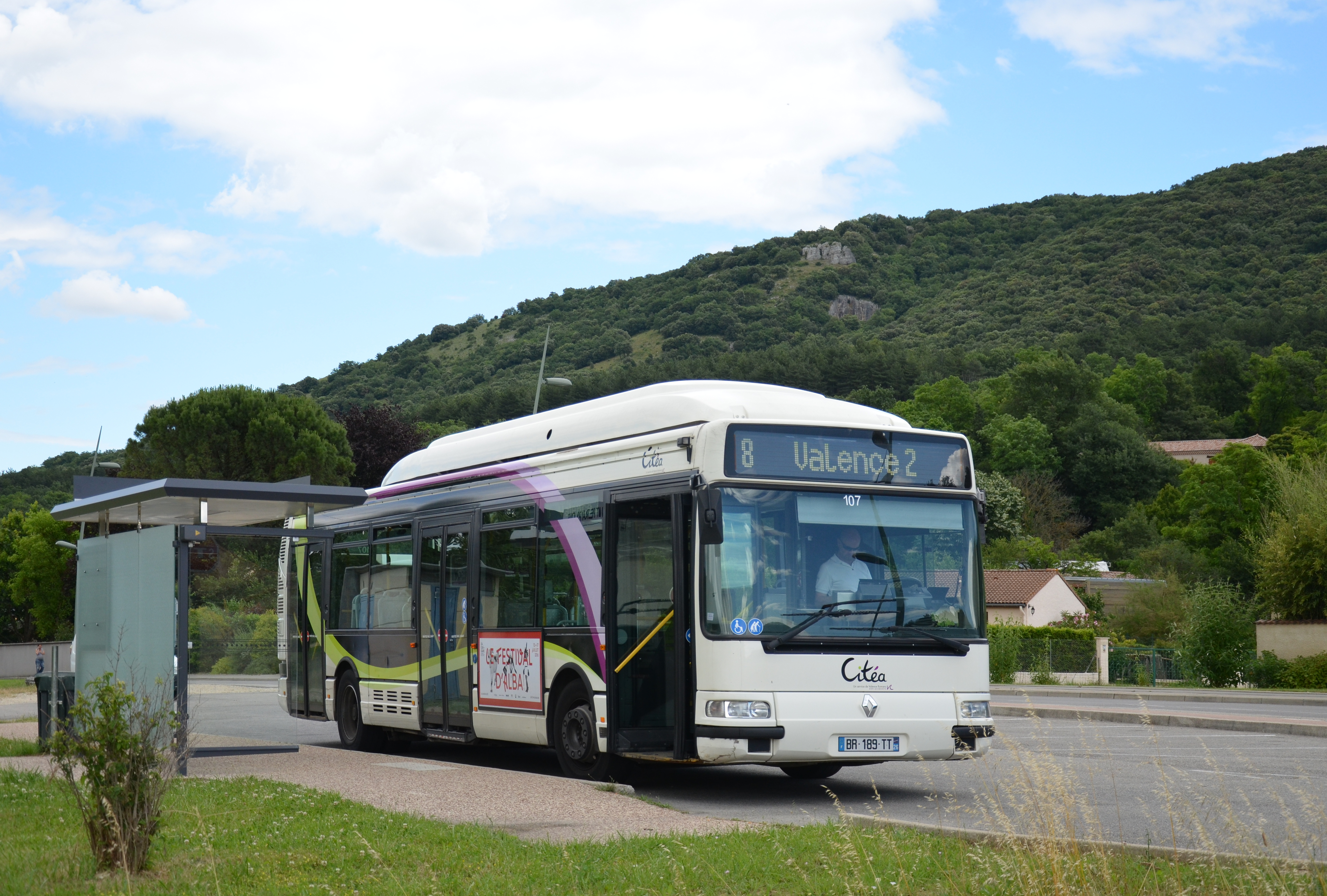 Renault Agora S au terminus "Saint-Peray Ployes" de la ligne 8 du réseau Citéa de Valence.